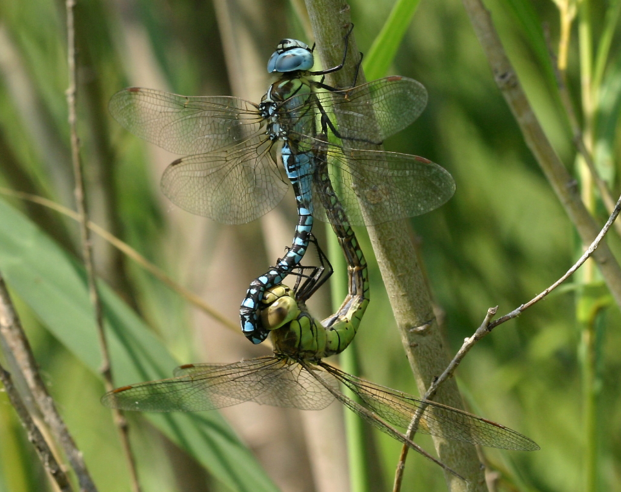 Aeshna affinis, Southern Migrant Hawker, Südliche Mosaikjungfer, Zuidelijke Glazenmaker Copula Author: Robert Geerts